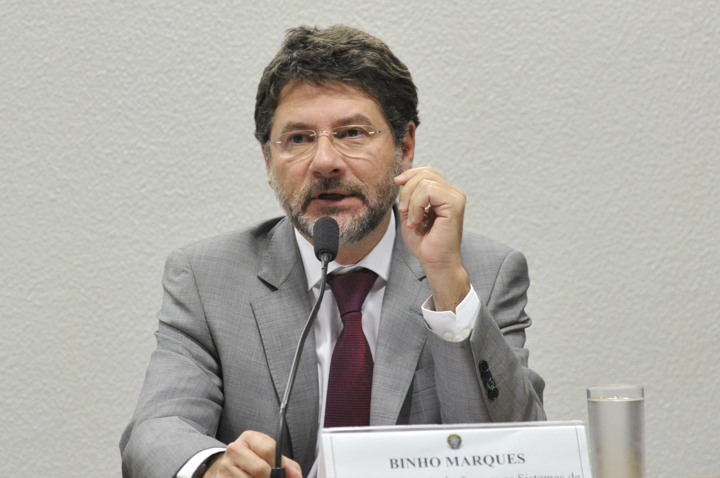 Comissão de Educação, Cultura e Esporte (CE) realiza audiência pública interativa para debater a valorização dos profissionais da educação: piso, carreira, jornada e elevação da remuneração média. Participam da reunião, os presidentes da Confederação Nacional dos Trabalhadores em Educação e da Associação Nacional pela Formação dos Profissionais da Educação; e representantes da Confederação Nacional dos Municípios e do Ministério da Educação. Em pronunciamento, o secretário de articulação com os sistemas de ensino do Ministério da Educação (Sase/Mec), Binho Marques. Foto: Geraldo Magela/Agência Senado